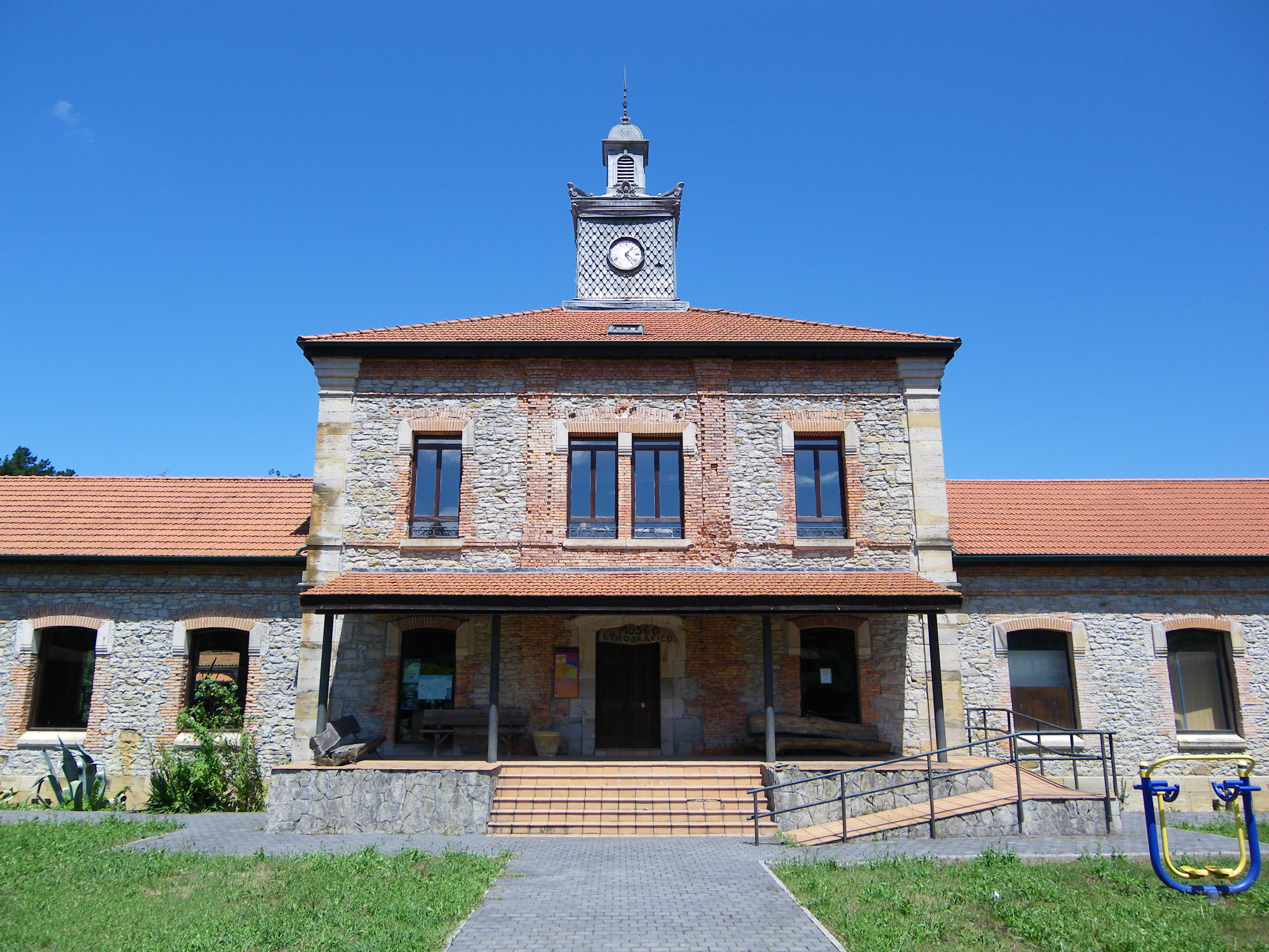 Villaverde Harana udalerriko museo etnografikoaren aurrealdea, Kantabria.